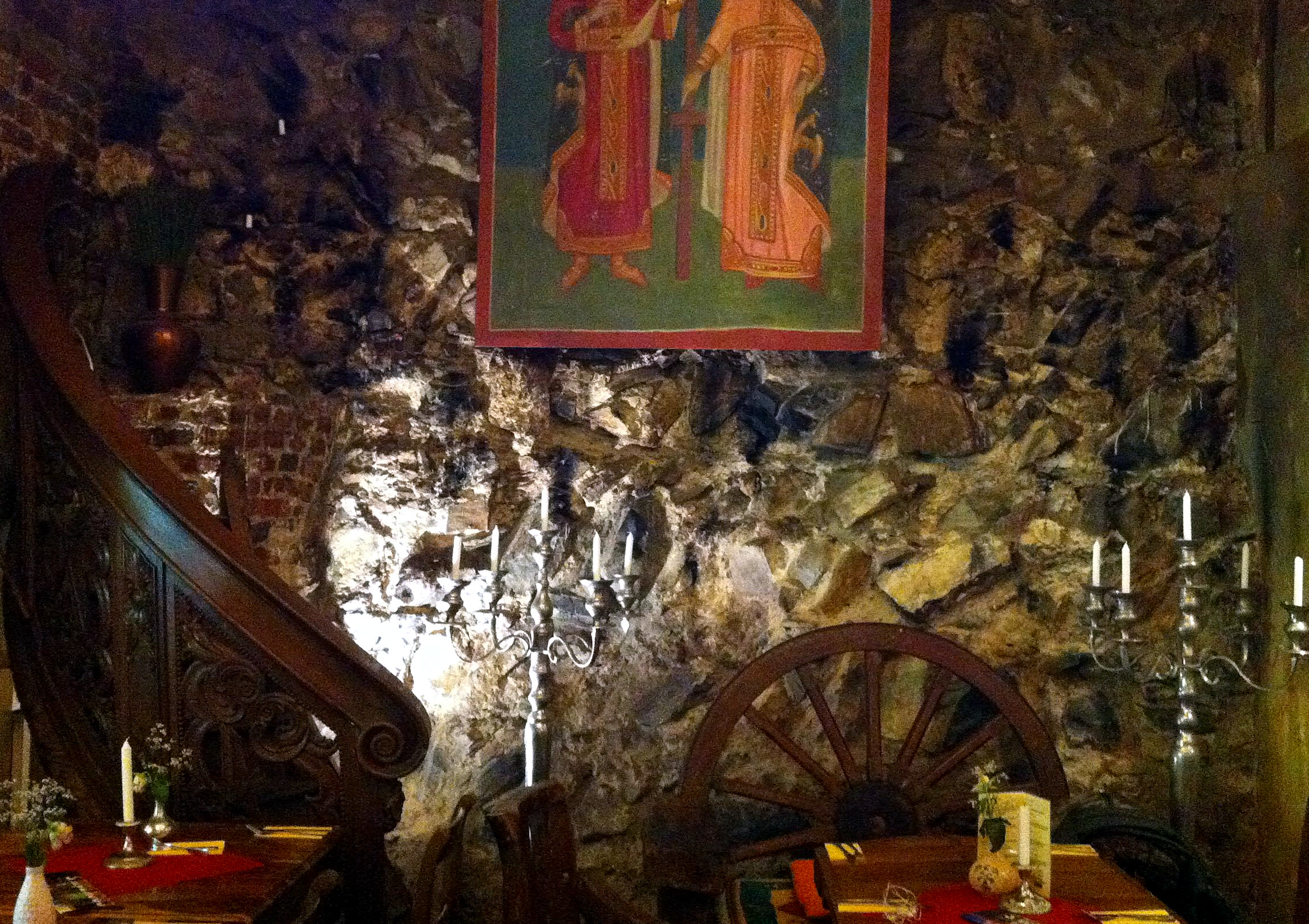 Füllmauerwerk der innere Stadtmauer von Aachen im Restaurant Magellan